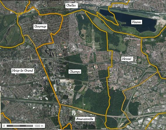 Champs-sur-Marne – Vue satellite : Des données librement réutilisables Les cartes et photographies sont librement réutilisables selon les « conditions générales de réutilisation des informations publiques ». Pour favoriser la création de nouveaux produits et services et contribuer au développement économique, la loi n°78-753 du 17 juillet 1978 crée un droit de réutilisation des informations publiques. Ainsi, les informations qui entrent dans le champ de cette loi peuvent être exploitées à d’autres fins que celles de la mission de service public pour les besoins de laquelle elles ont été produites, y compris commerciales